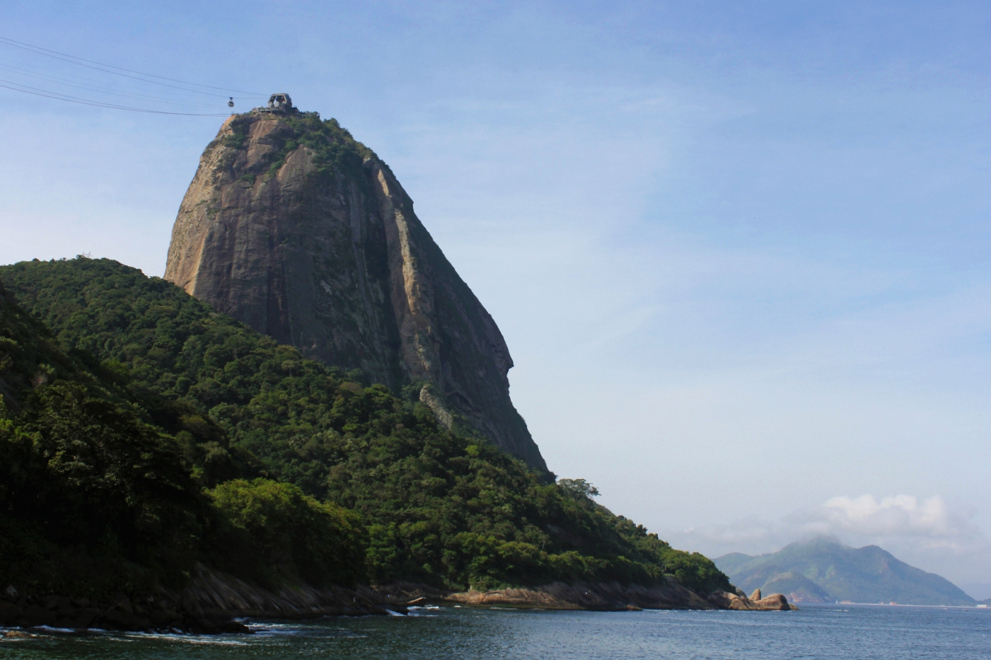 Pão de açucar visto a partir da praia Vermelha.